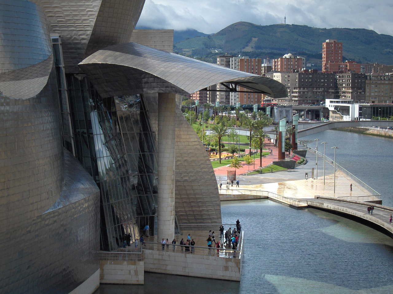 Guggenheim museum in Bilbao, Spain